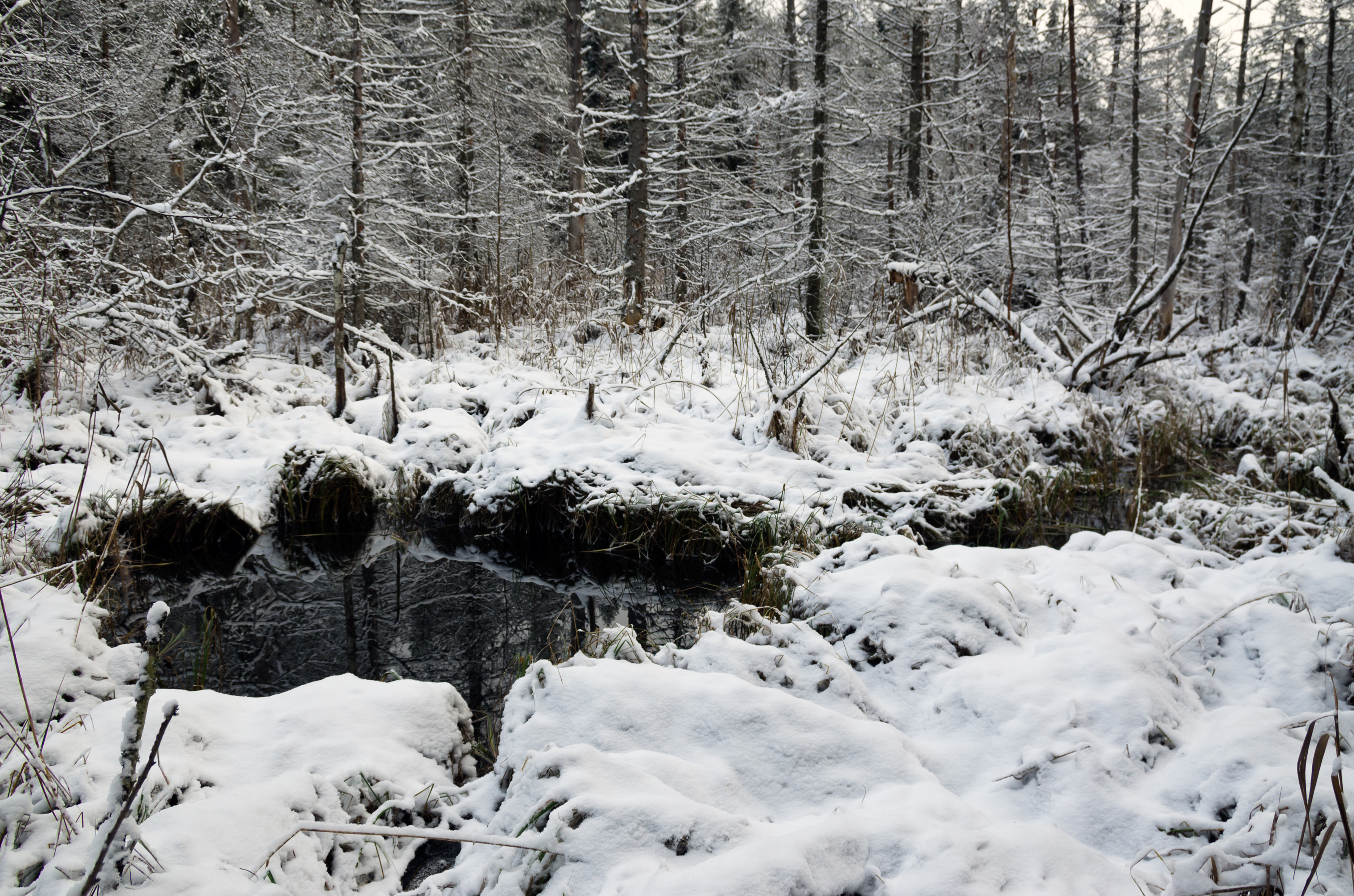 Üks Metsanurga allikatest Endla looduskaitsealal